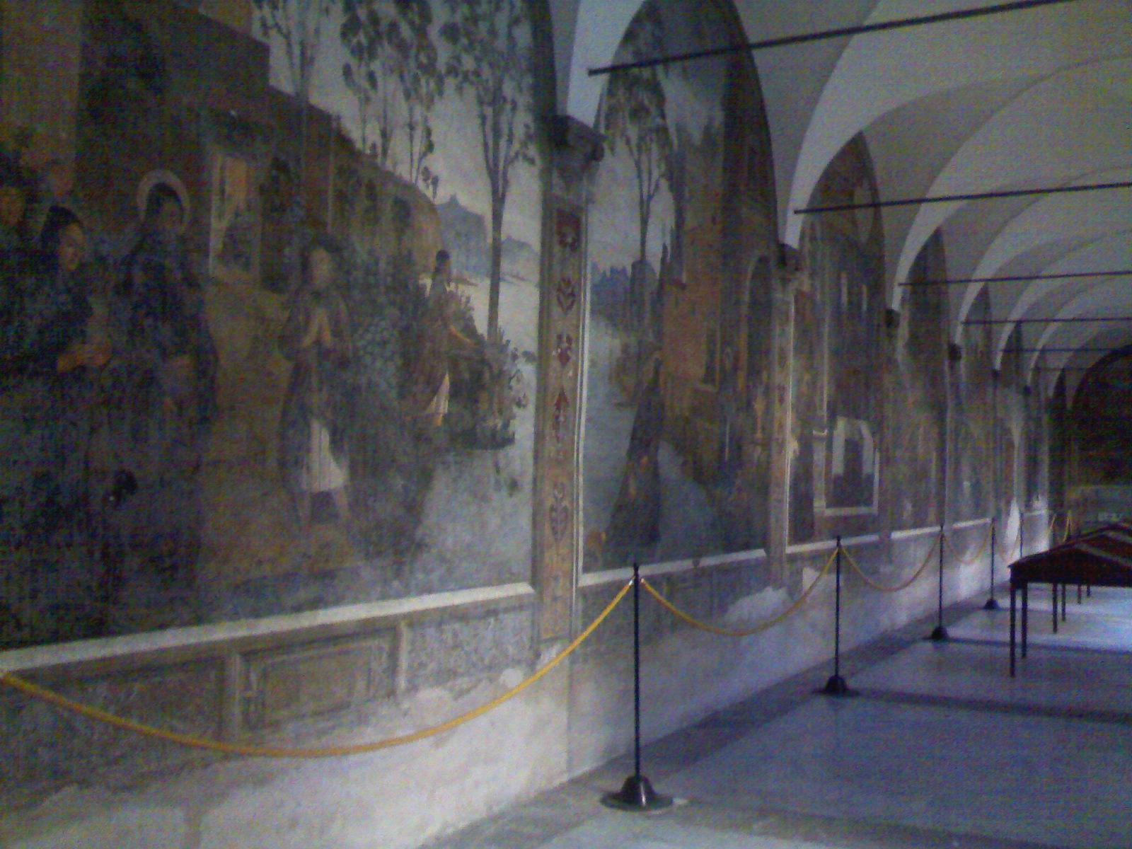 chiostri dell'archivio storico (napoli)